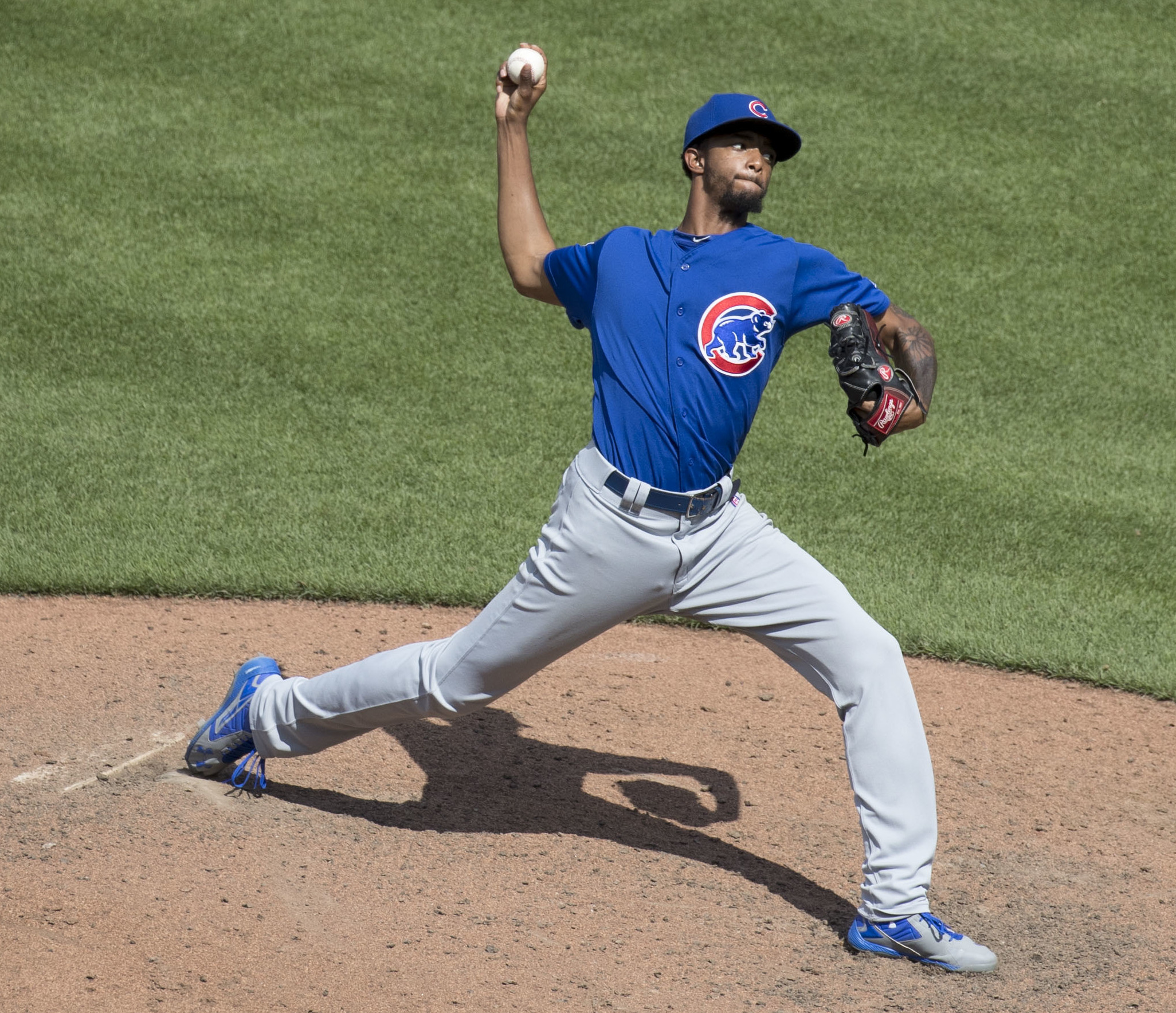 Cubs at Orioles 7/16/17